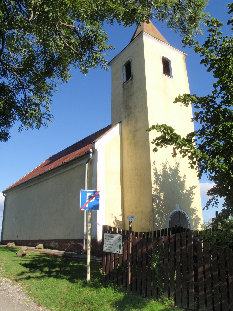 Saint Margit Kapelle in Somloerberg